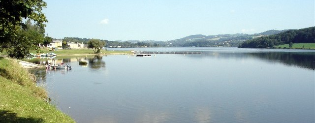 Le lac de Villefranche-de-Panat (Aveyron)